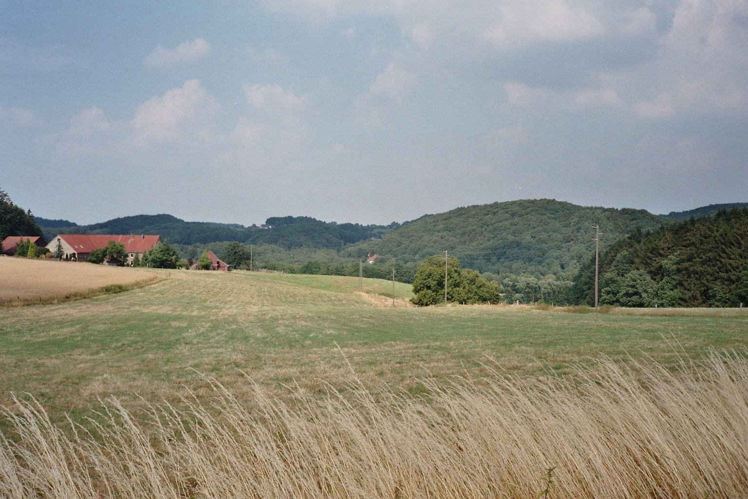 Landschaft im Bereich des Hammertals in Niedersprockhövel, Deutschland; Blick von der Hiddinghauser Straße (Hausnr. 16) am Nordhang des Sirrenbergs zum Hof Niedergethe (links); im Geländeeinschnitt hinter der Hof und vor den Waldhängen im Hintergrund (links Semberg/Stoltenberg in Witten-Durchholz, rechts Schultenbusch in Sprockhövel-Hiddinghausen) verlaufen die A43 und der Pleßbach (das eigentliche Hammertal; dort befindet sich auch rechts etwas außerhalb des Bildes das ehem. Hammerwerk Ibachsmühle). Der abgebildete Bereich gehört weitgehend zum Landschaftsschutzgebiet „Stüter/Sprockhövel/Hiddinghausen“; ein Teil der Wälder im Hintergrund liegt im Landschaftsschutzgebiet „Kämpen/Durchholz“.